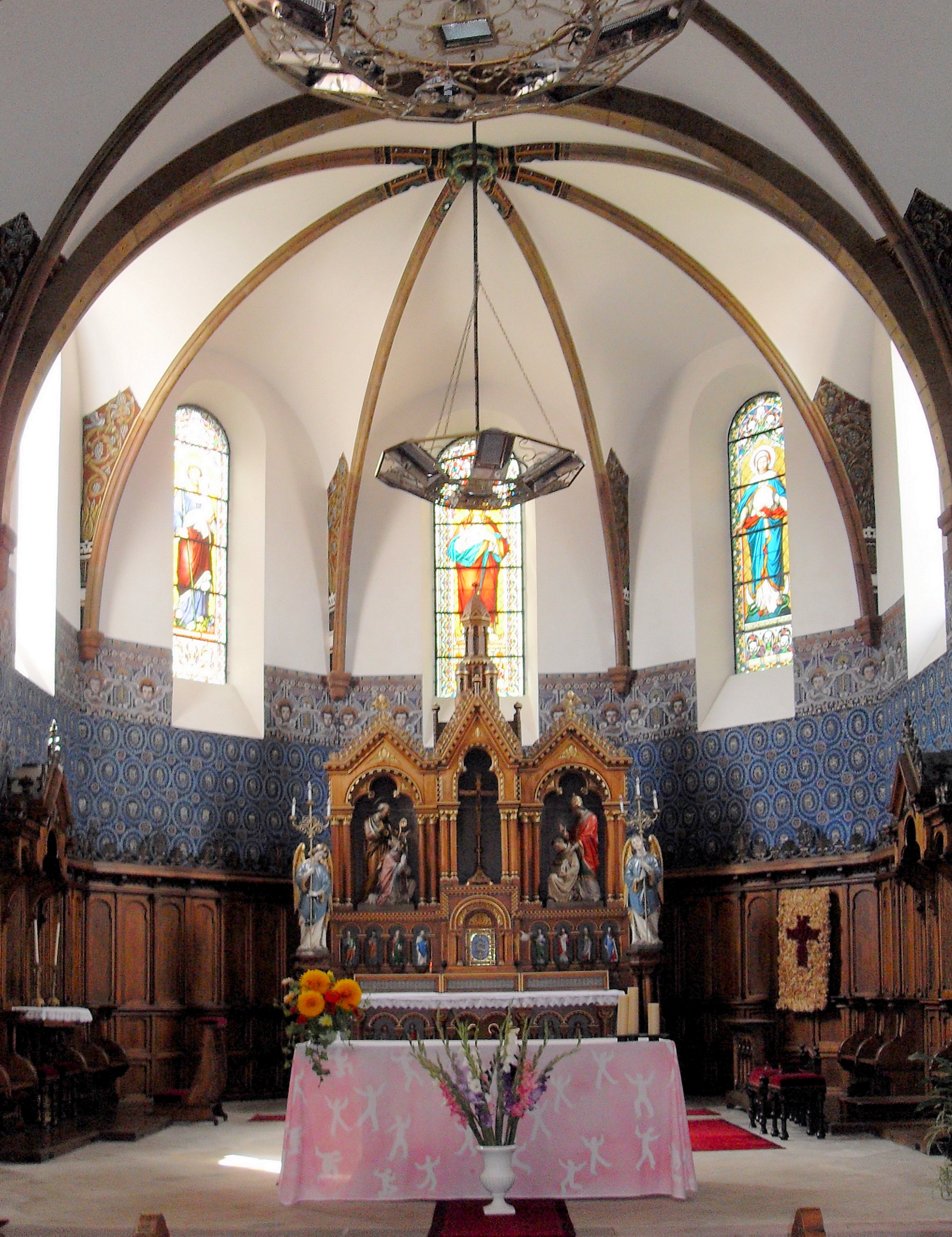 L'intérieur d'église Saint-Benoît à Bergholtzzell